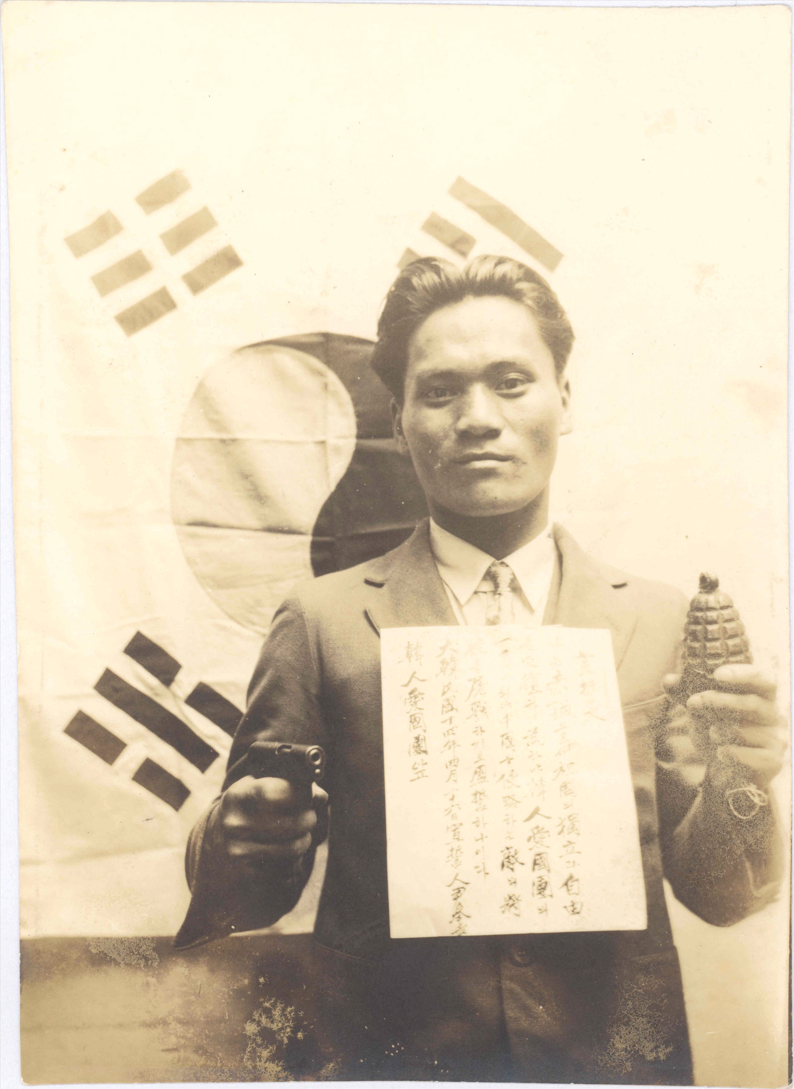 윤봉길 선서장면